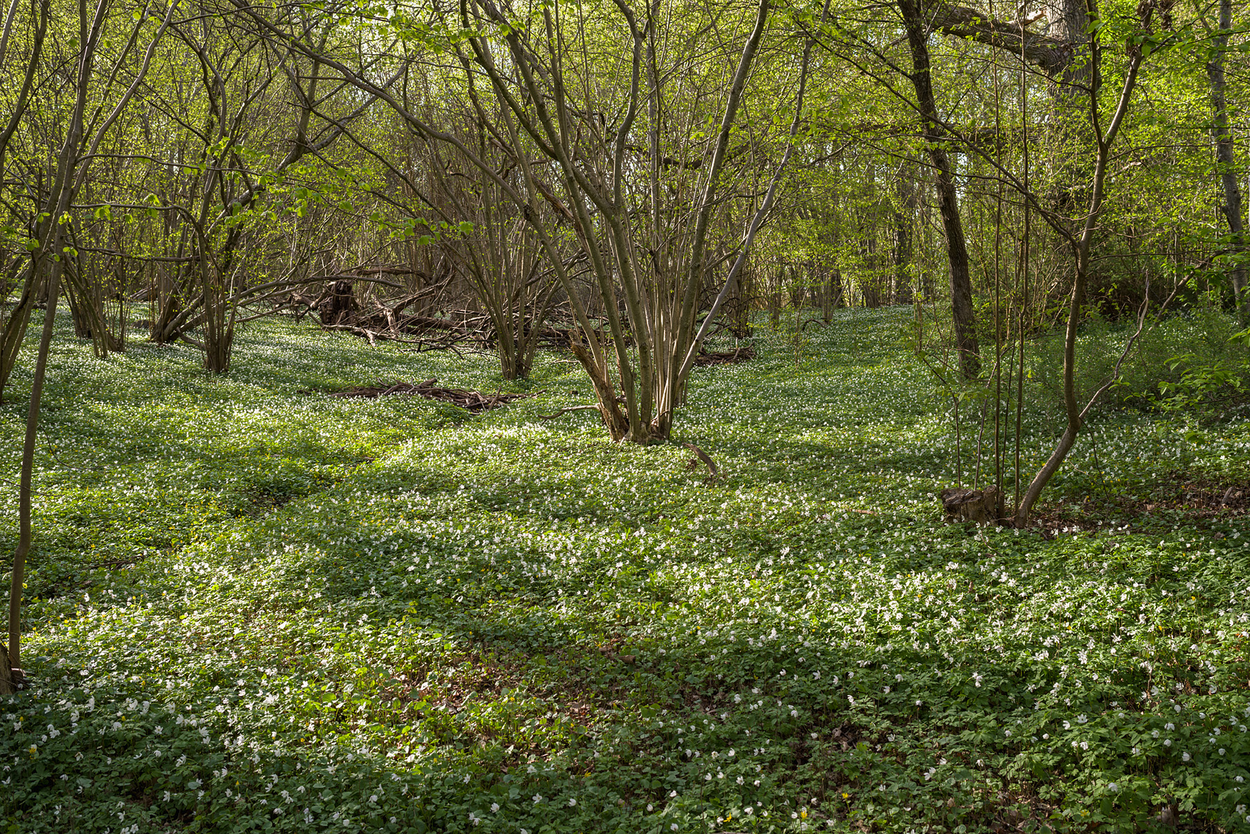 Djuröns naturreservat ligger strax utanför Norrköpings stad. I reservatet finns förutom gamla ståtliga ekar hasselbuketter och på våren vitsippsmattor.